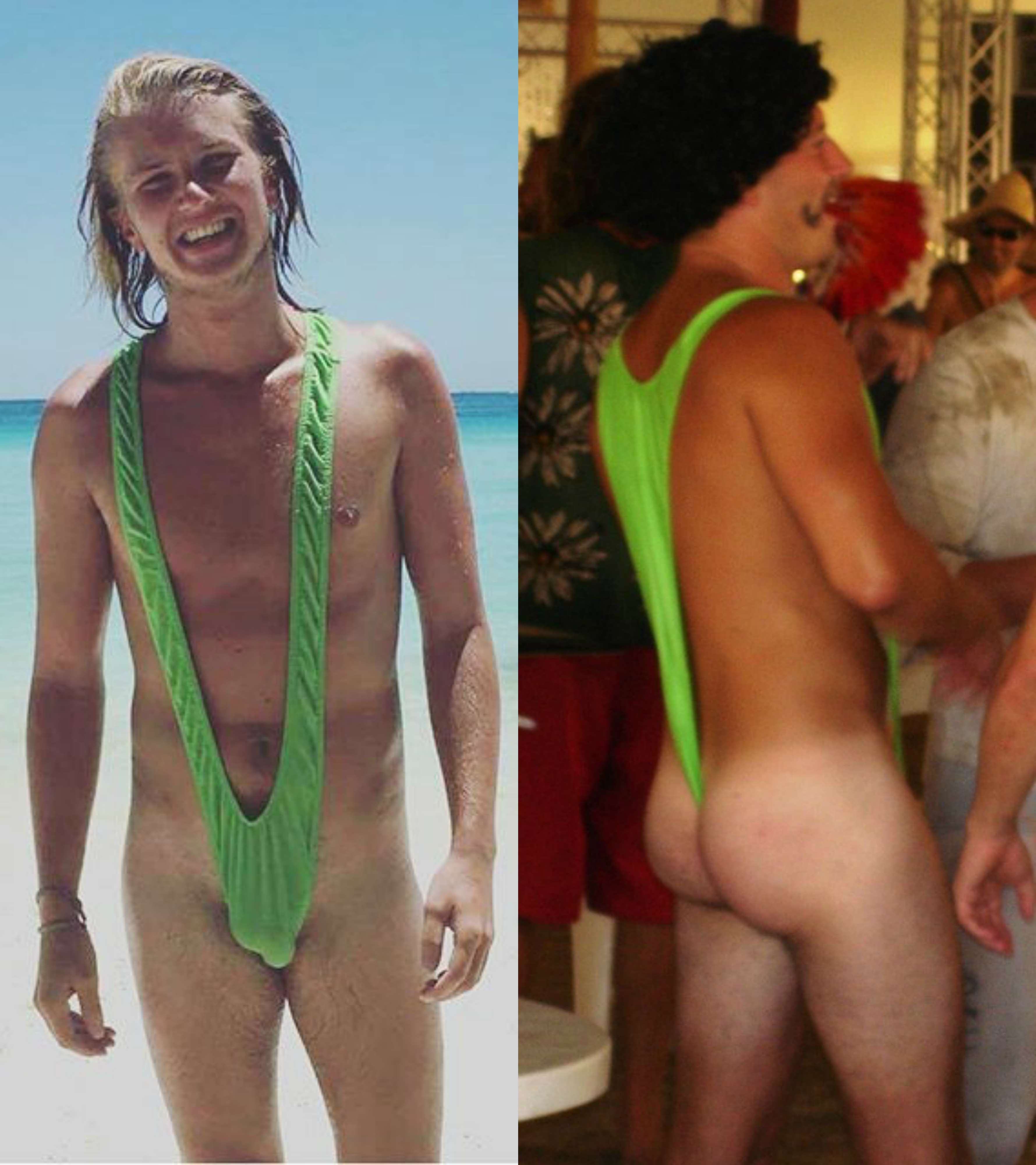 Mankini